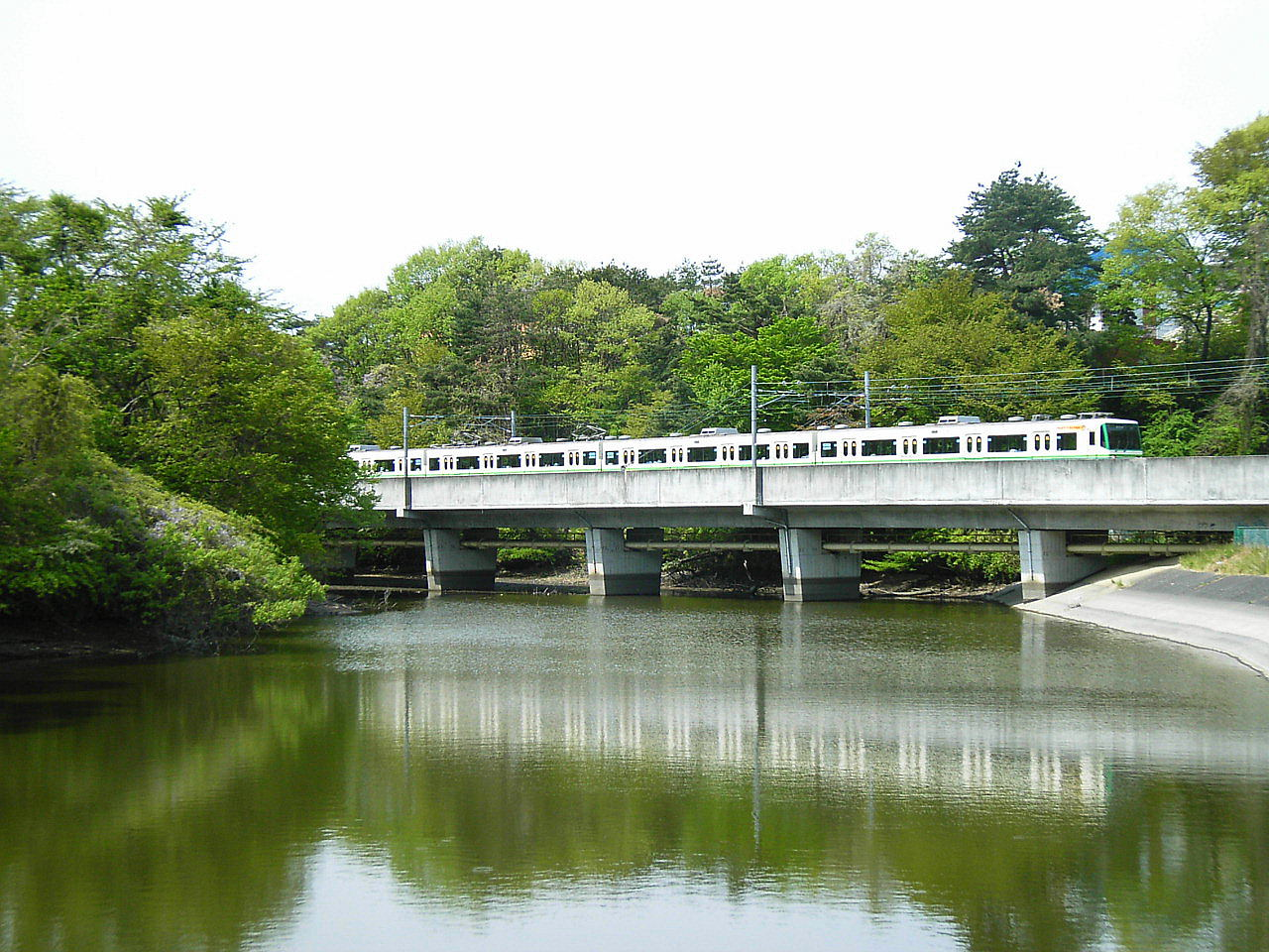 Sendai Subway over Mamisawa Pond. Sendai, Miyagi prefecture, Japan.